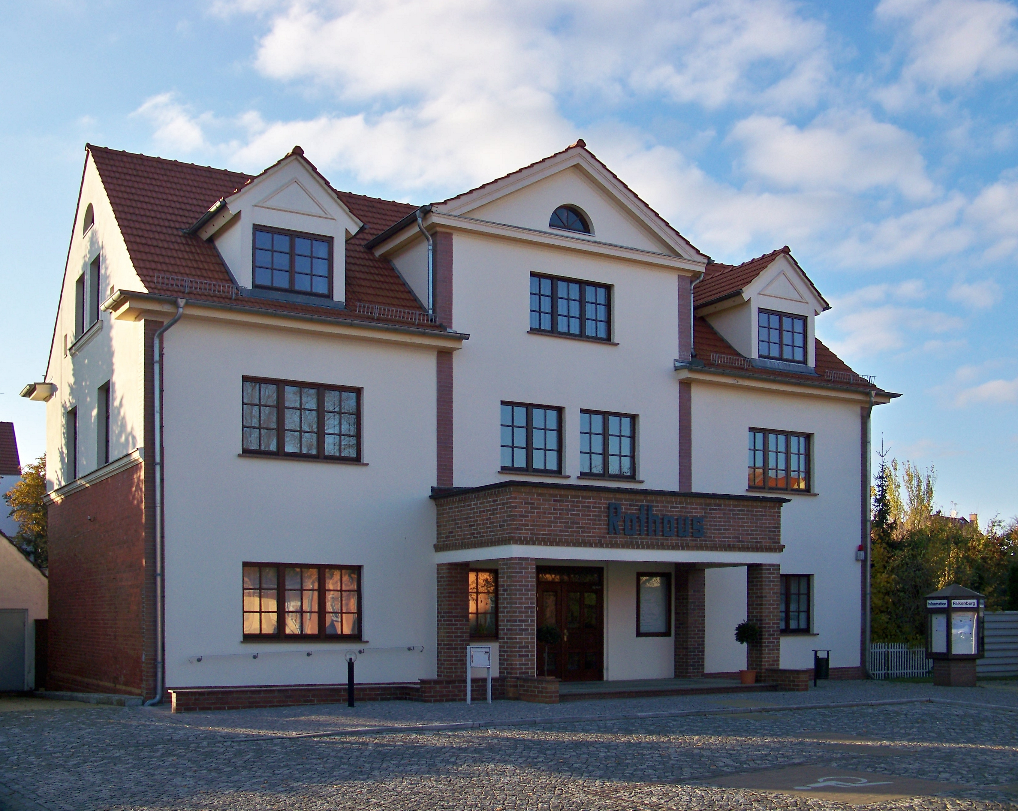 Rathaus der Stadt Falkenberg (Elster)